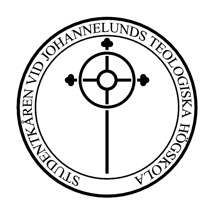 Logotypen för Studentkåren vid Johannelunds teologiska högskola. Sedan våren 2019. Korset i logotypen är ett Johannelundskors.